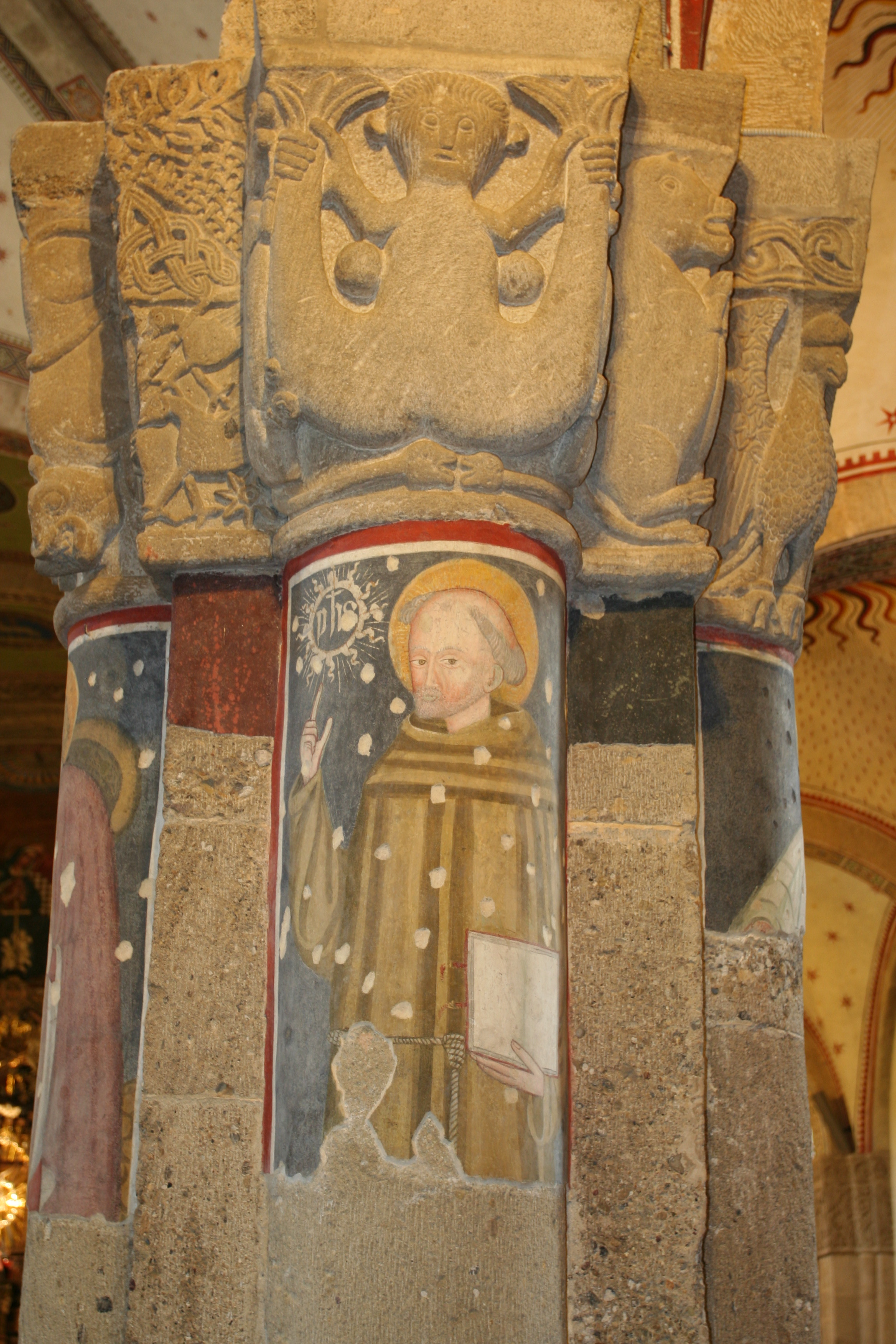 Rivolta d'Adda, chiesa di San Sigismondo: interno, dettaglio affresco di San Bernardino da Siena su una delle colonne della navata centrale con capitello decorato con sirena bicaudata.